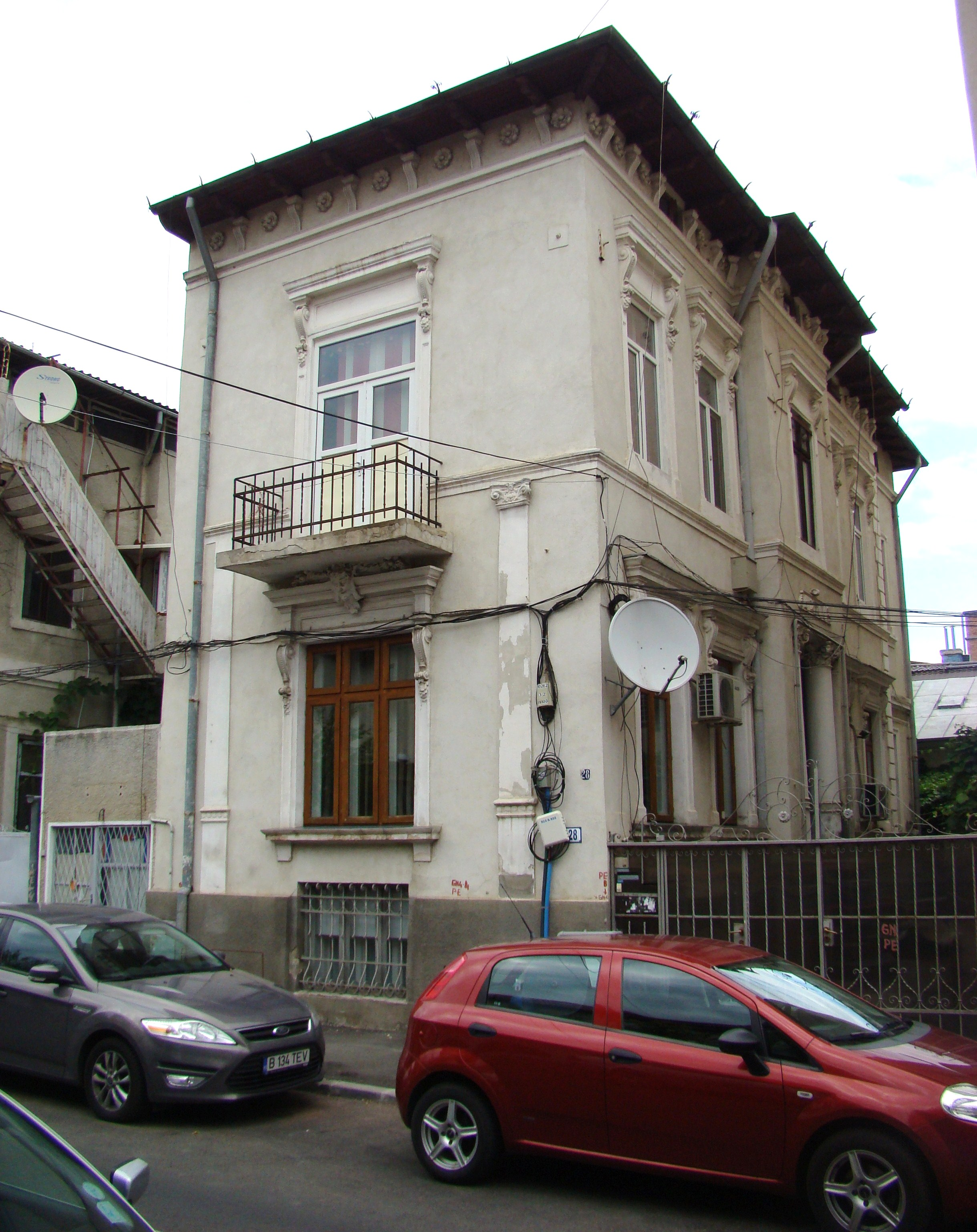 Casă monument istoric, str. Louis blank, nr.28